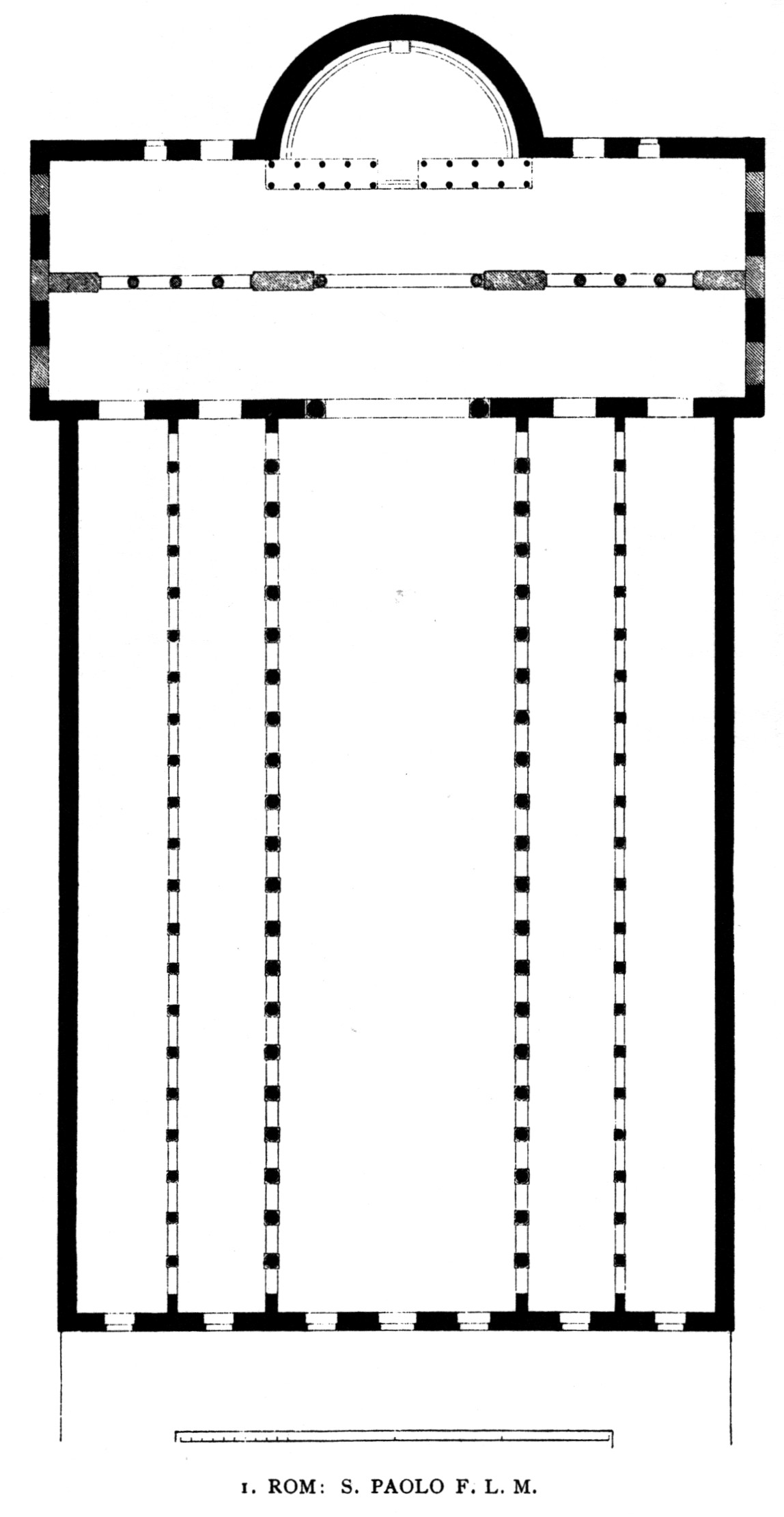 Basilica di San Paolo Fuori le Mura. Floor plan.